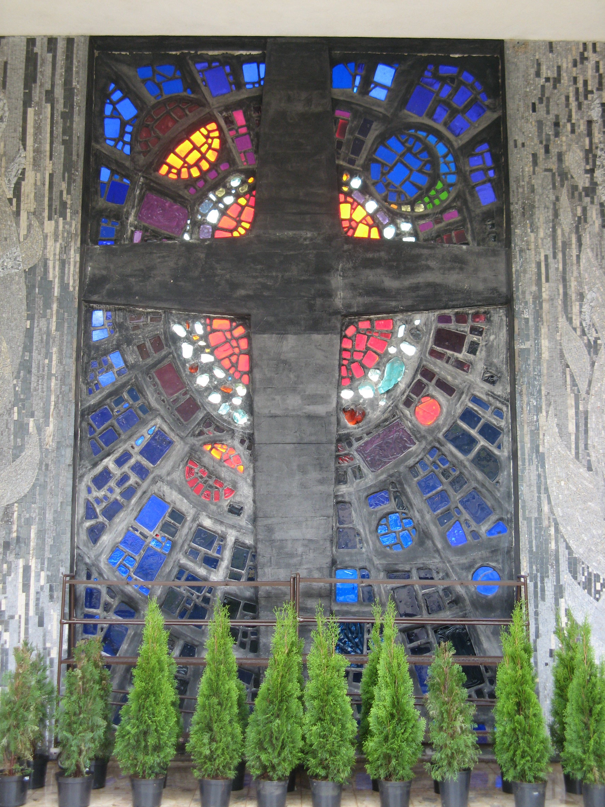 Glasmosaik von Hermann Bauch, Aufbahrungshalle Ober Sankt Veiter Friedhof, Wien-Hietzing